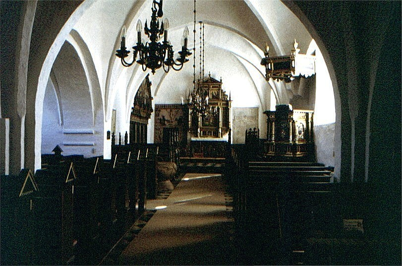 Visborg Kirke i Danmark. Skib set mod øst